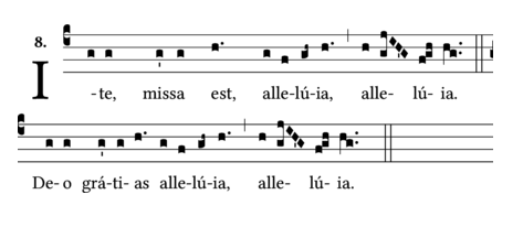 Finis Sanctae Missae in tempore paschali: Ite, missa est, alleluia. Deo gratias, alleluia.